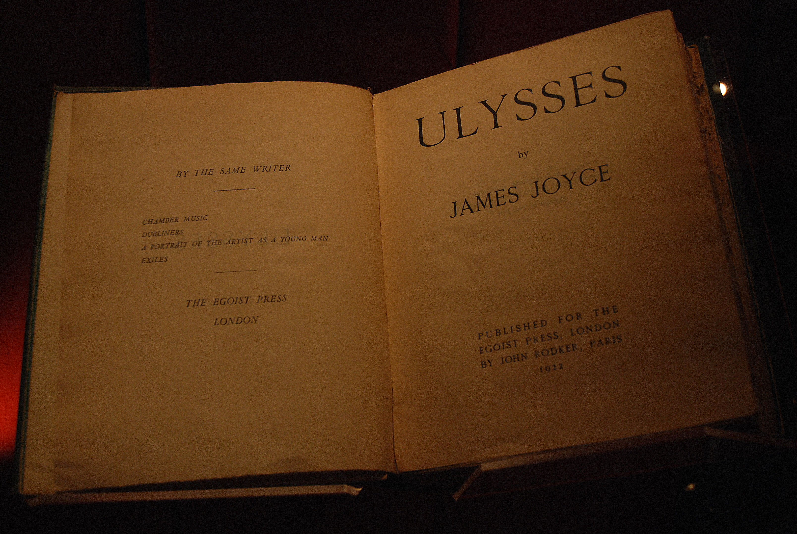 De "Ulysses" van James Joyce in de "John Rylands Library" in Manchester, Engeland